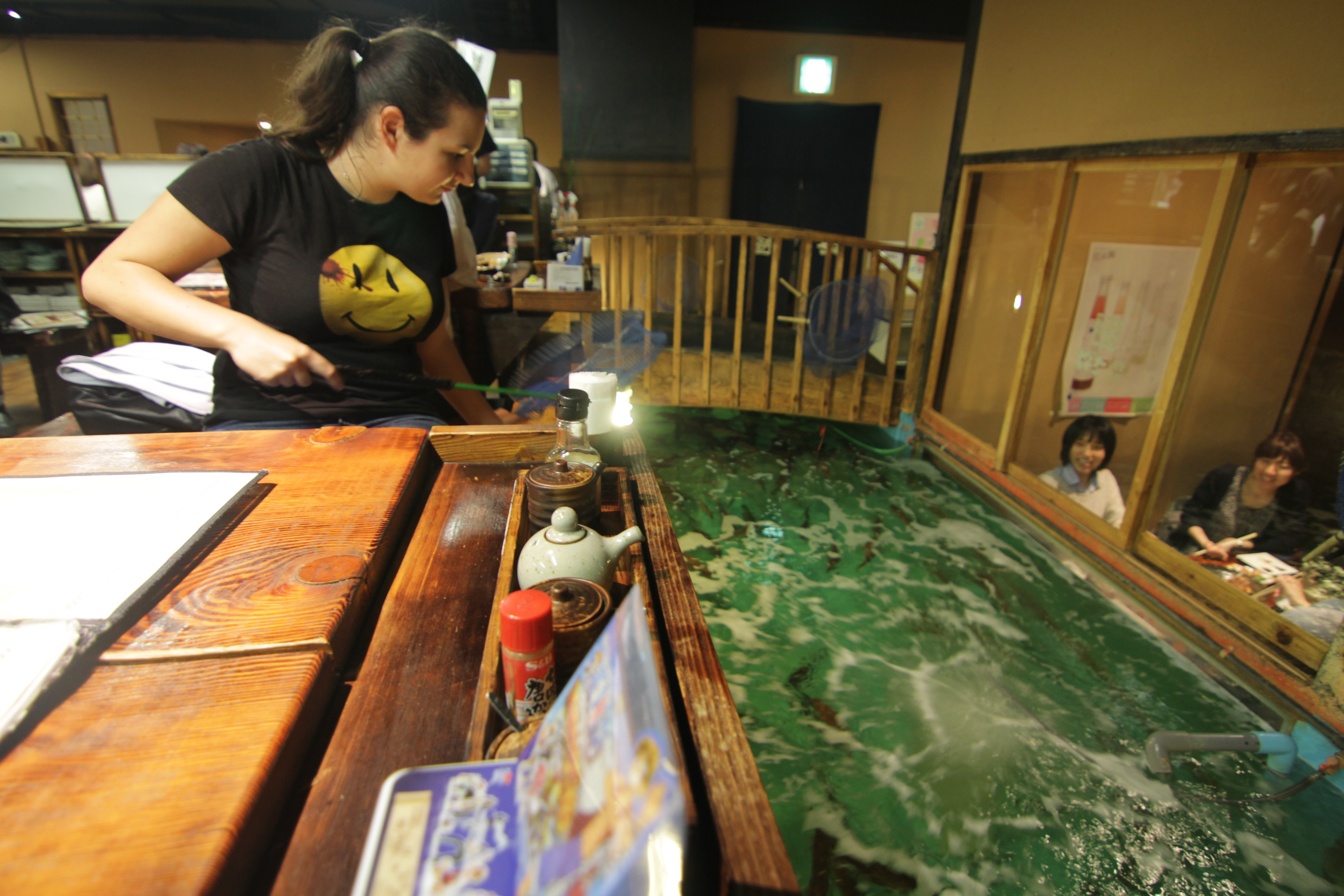 Helen Fishes for Dinner